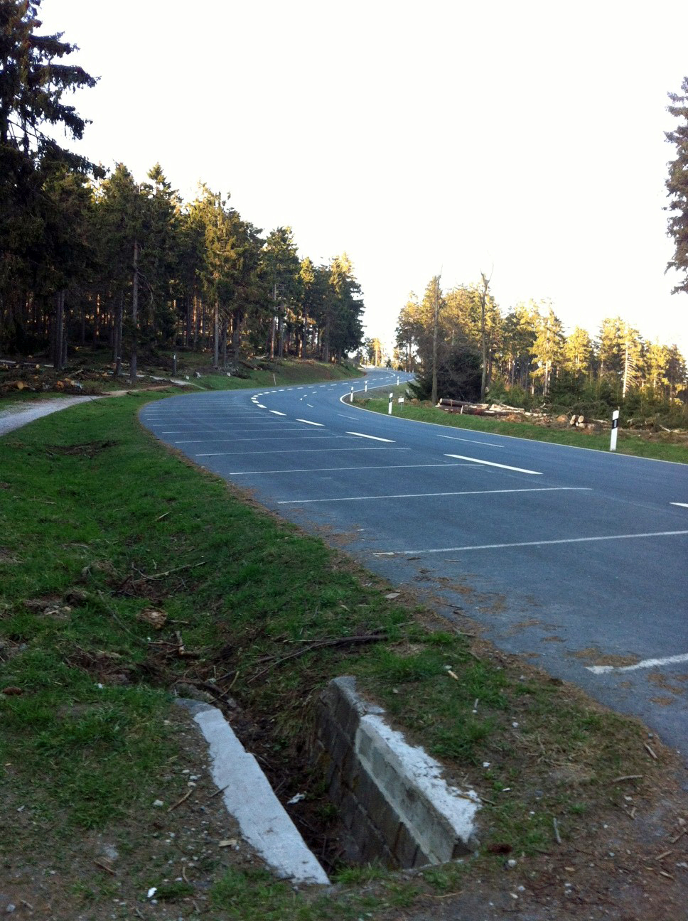 L3024 zwischen Kleiner Feldberg und (in Blickrichtung) Großer Feldberg